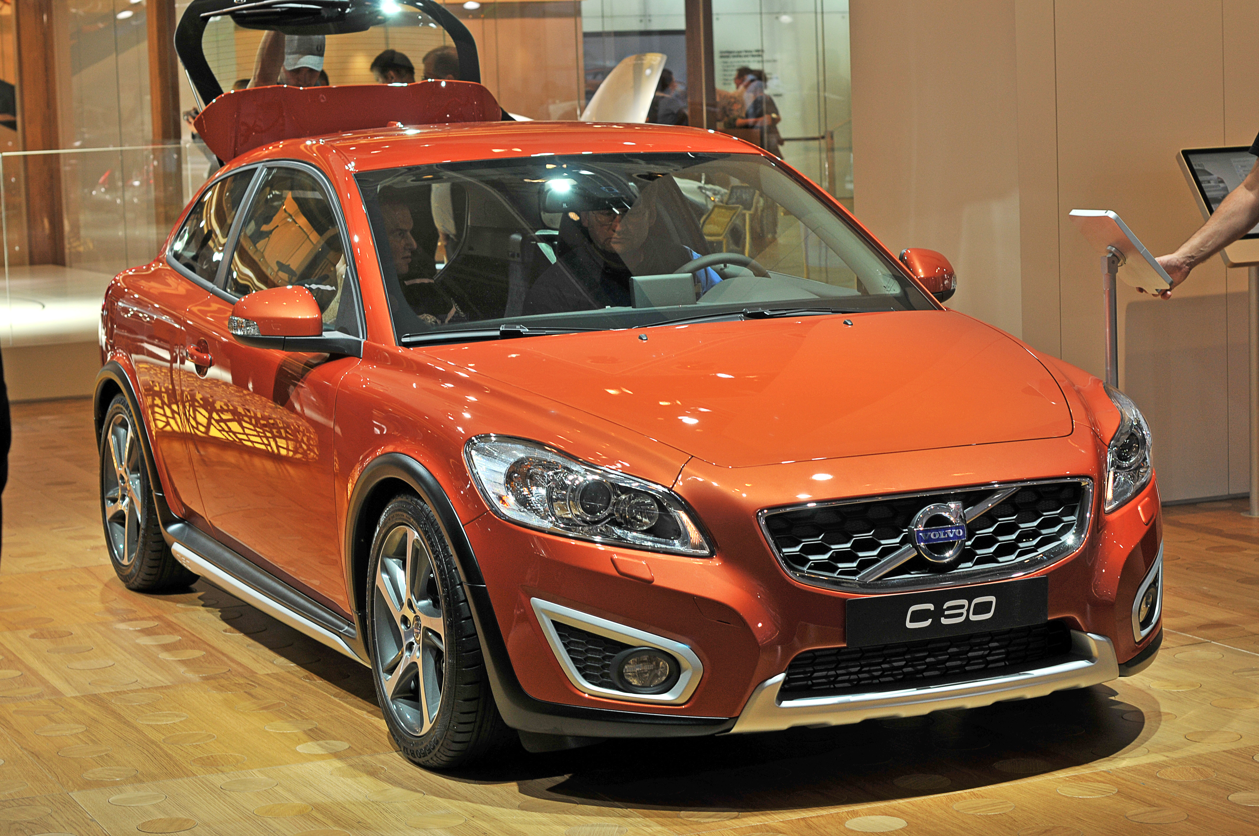 IAA 2011